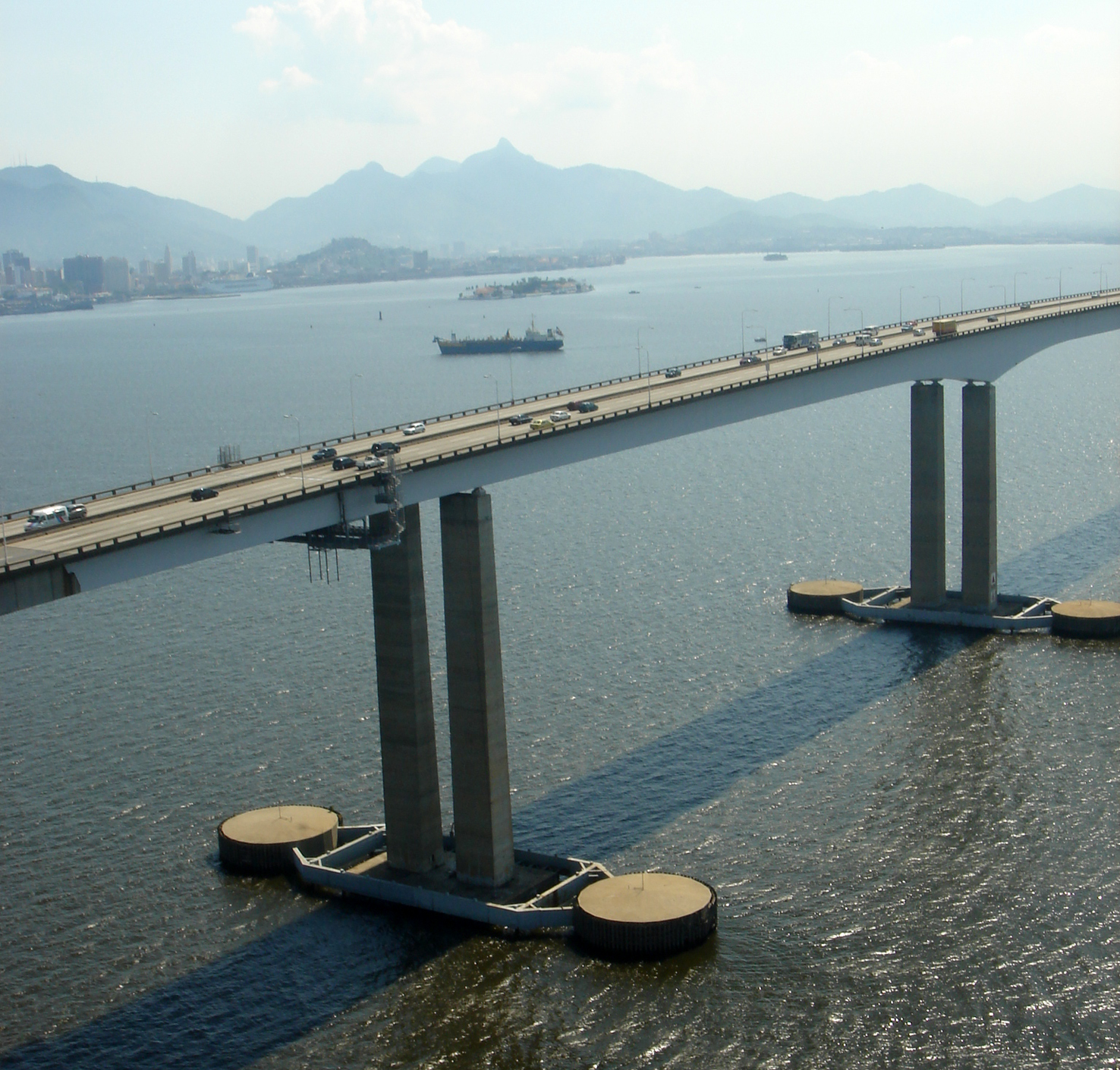 Ponte Rio-Niteroi